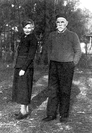 Деникин, Антон Иванович и его жена Ксения во Франции, конец 1930-х гг.